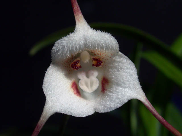 Beschreibung: Dracula lotax Quelle: fotografiert am 18.01.2004 Fotograf: Wolfgang Apel 18:33, 13. Nov 2004 Toapel 640 x 480 (42028 Byte) (Lizenzstatus "GNU-FDL")